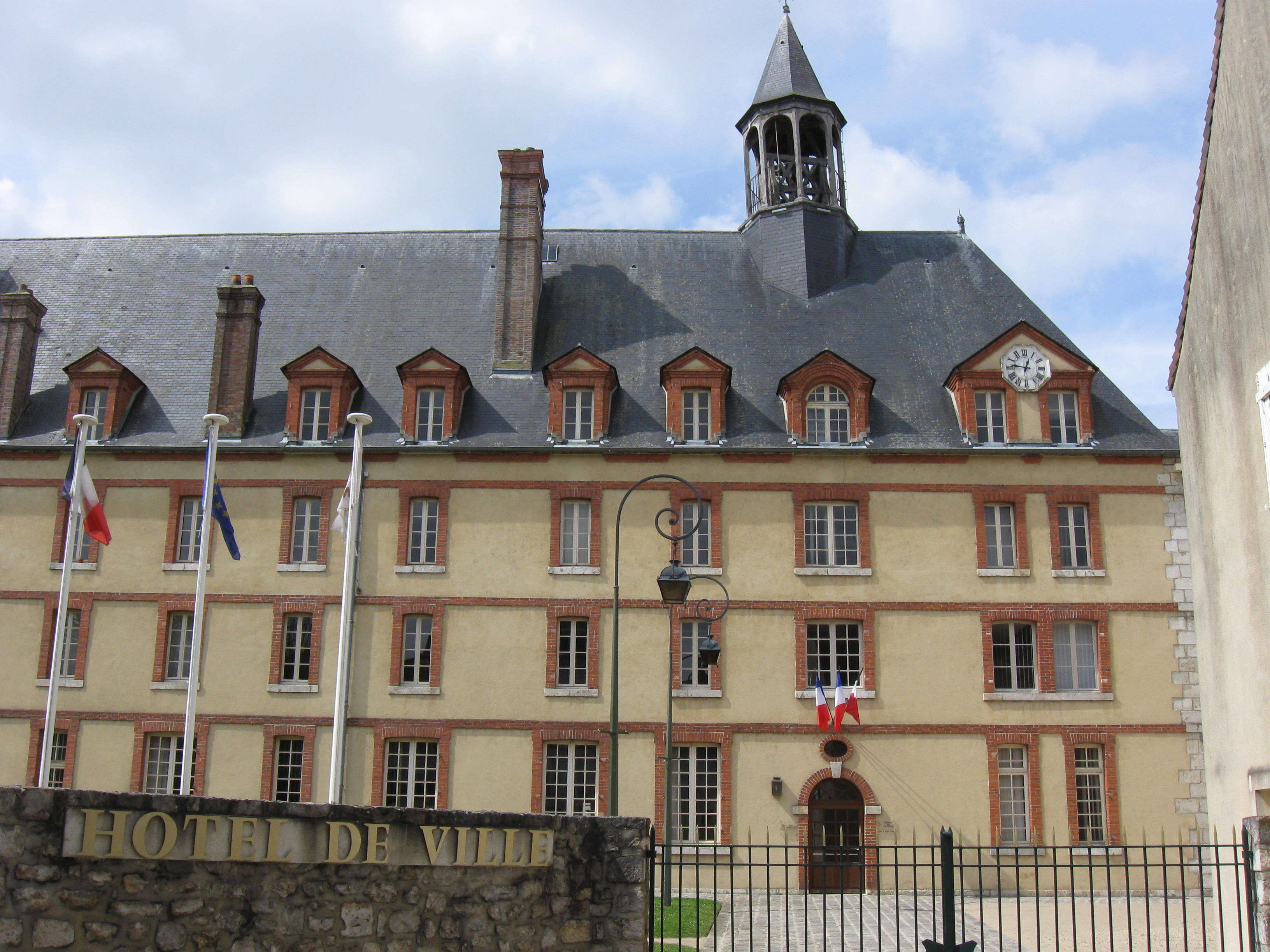 Hôtel de ville de Nemours, ancien couvent de la congrégation Notre-Dame , XVIIe siècle. (Département de Seine-et-Marne,région Île-de-France)